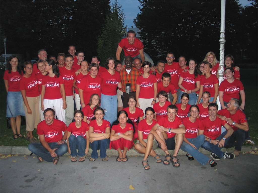 Zbor svetega Nikolaja Litija in Paul A. Smith na seminarju Gospela in Spirituala v Ljubljani avgusta 2005.